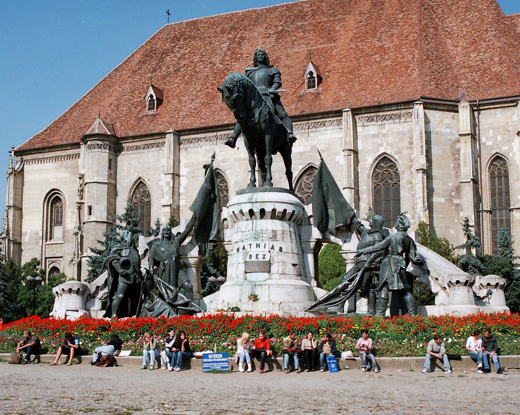 DIn nou la raposata statuie a raposatului Matia Corvin din Cluj. In (prima)vara lui 2006, cred.